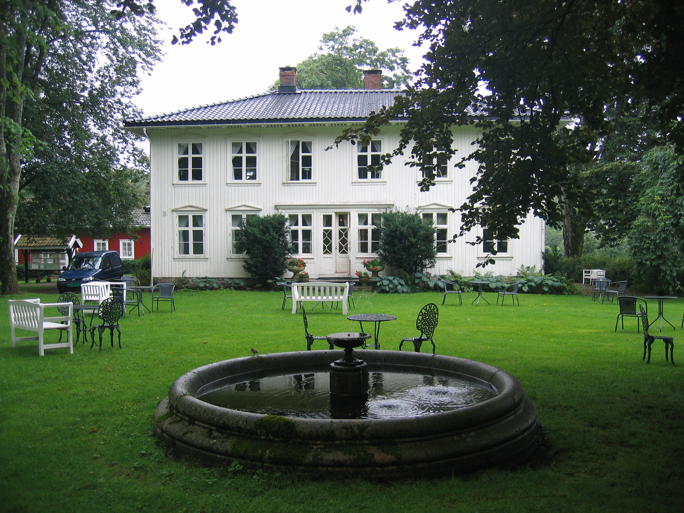 Farm house, Rød gård, Tjøme, Norway